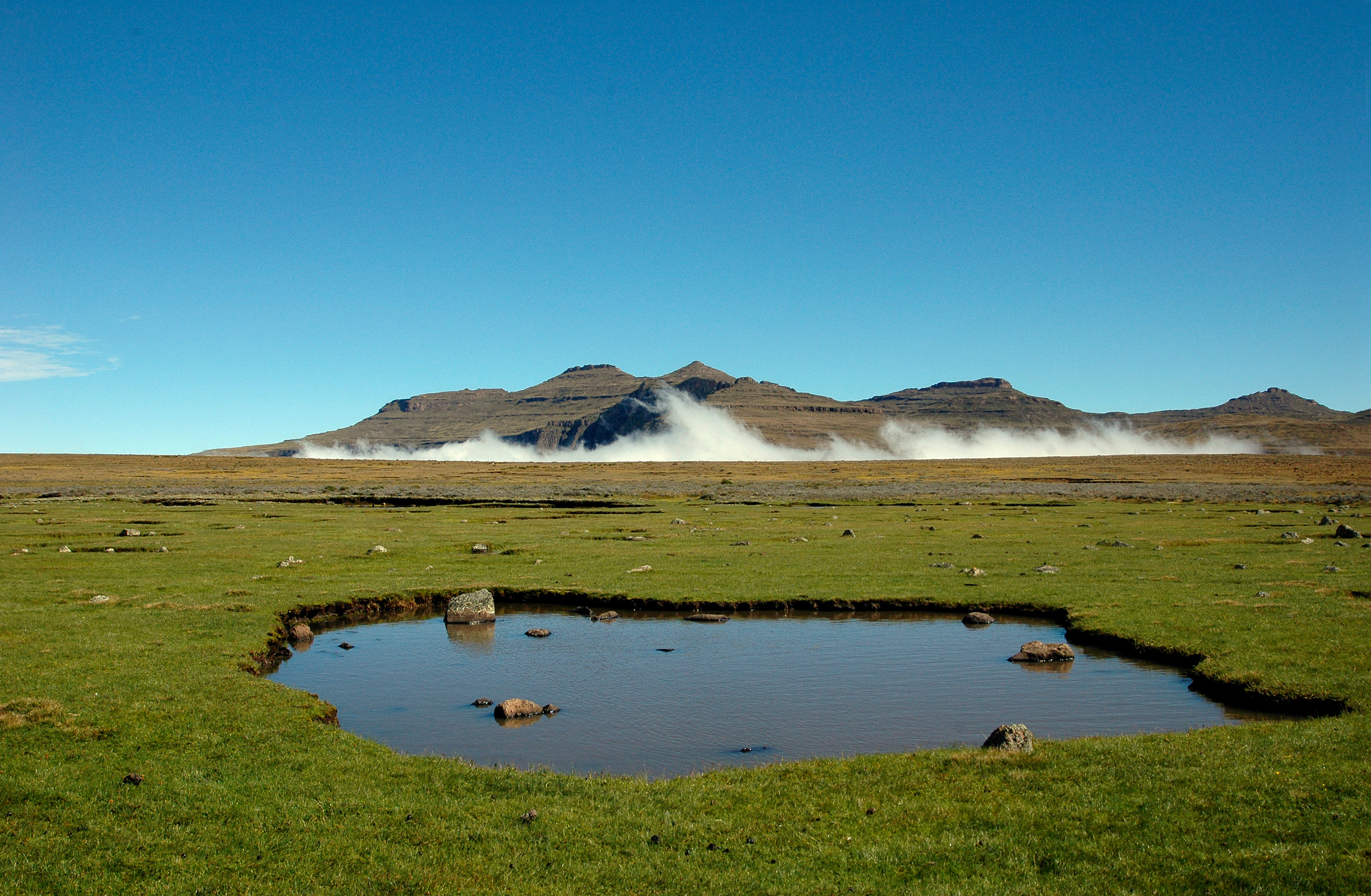 Ein Foto von den Drakensbergen fotografiert von Lesotho aus. Wo die Wolken aufsteigen ist Südafrika.